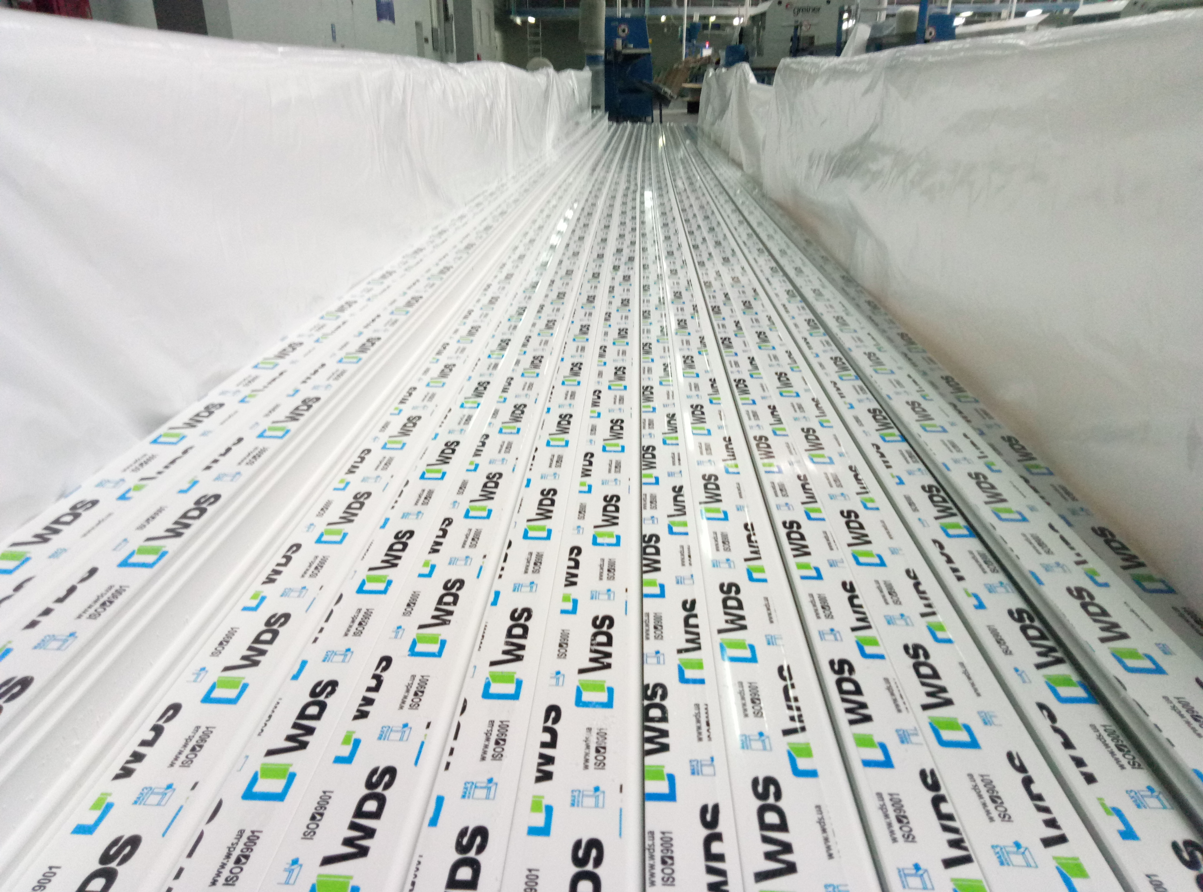 Так выглядит готовая продукция, произведенная на заводе МИРОПЛАСТ